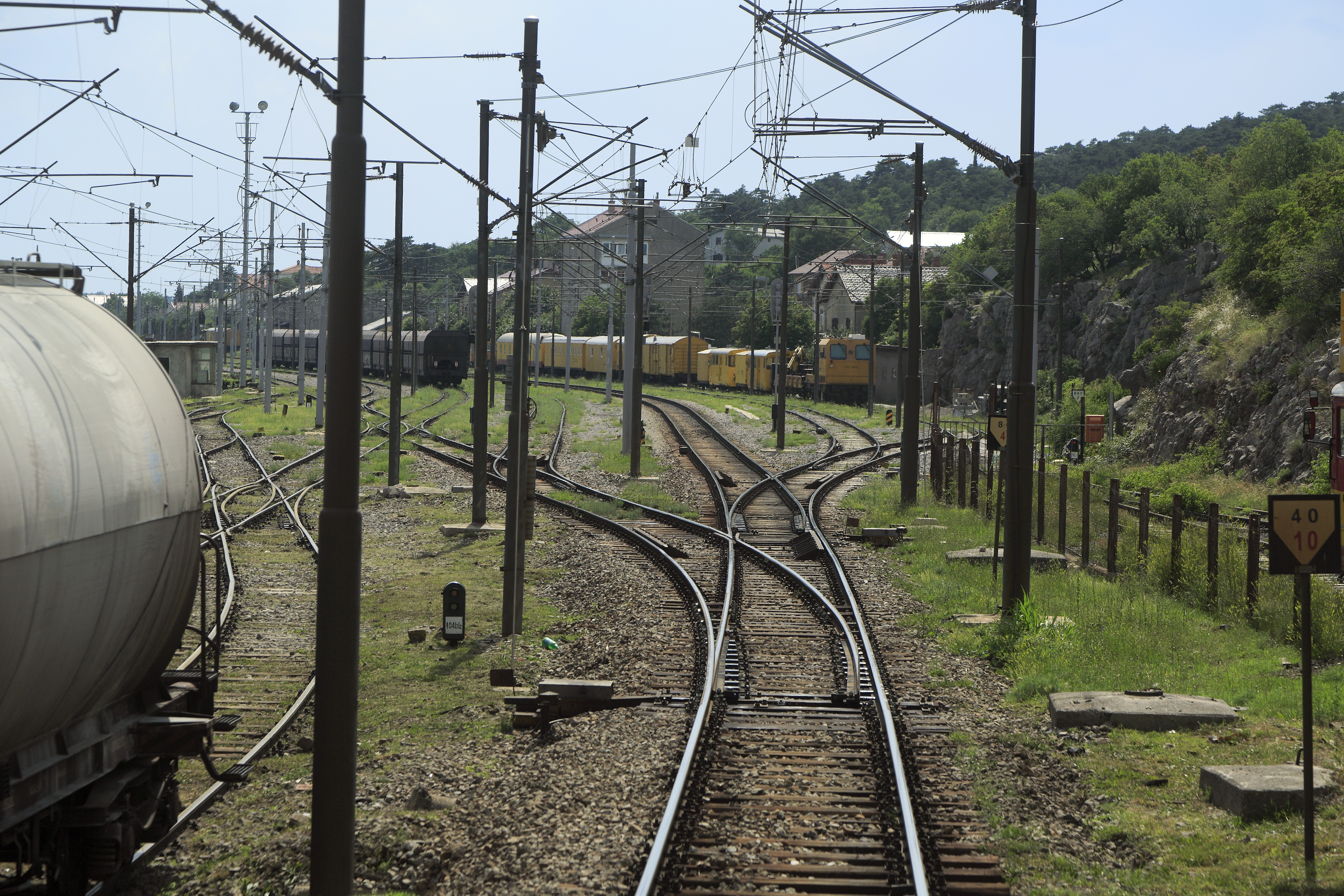 Ostkopf, Einfahrweiche aus Richtung Meja. Links liegen waagerechte Güterzuggleise, sie reichen noch vierhundert Meter nach Osten.